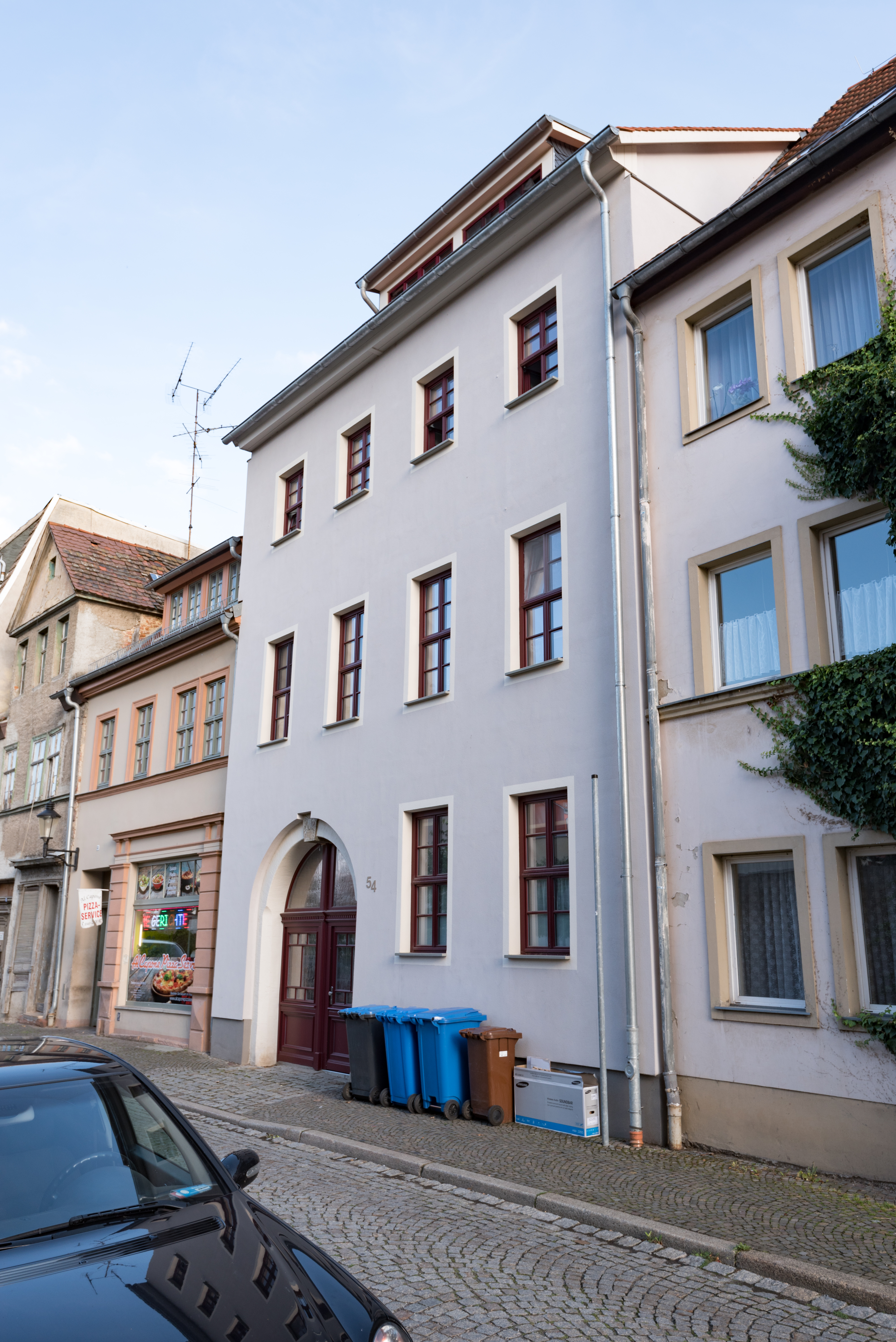 Naumburg (Saale), Neustraße 54